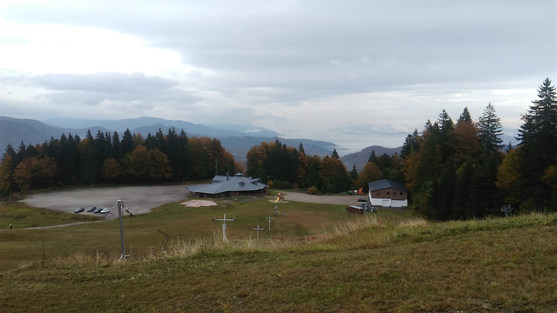 Királyka